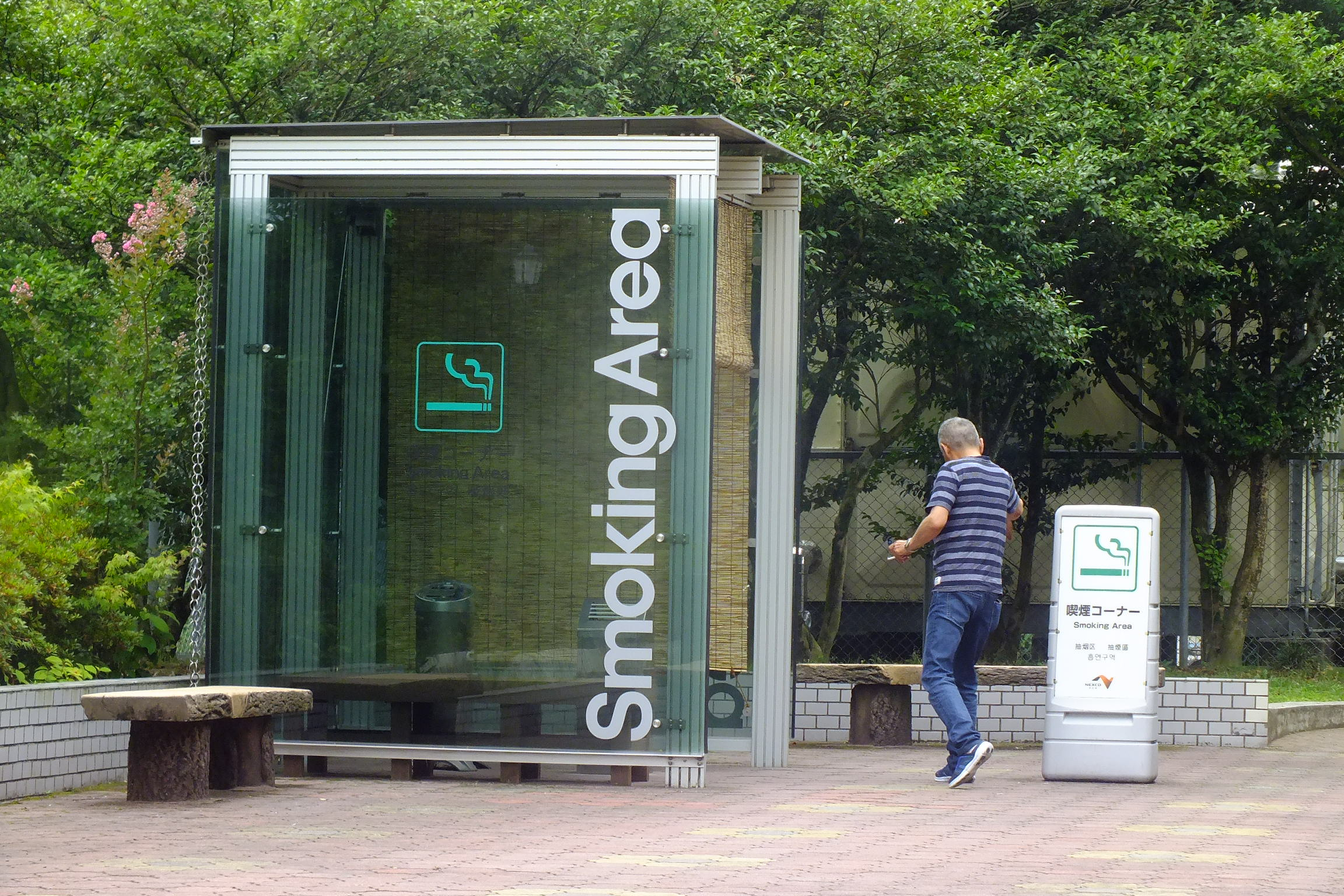 2017-06-29 Kokeizan-PA(虎渓山パーキングエリア) 喫煙室